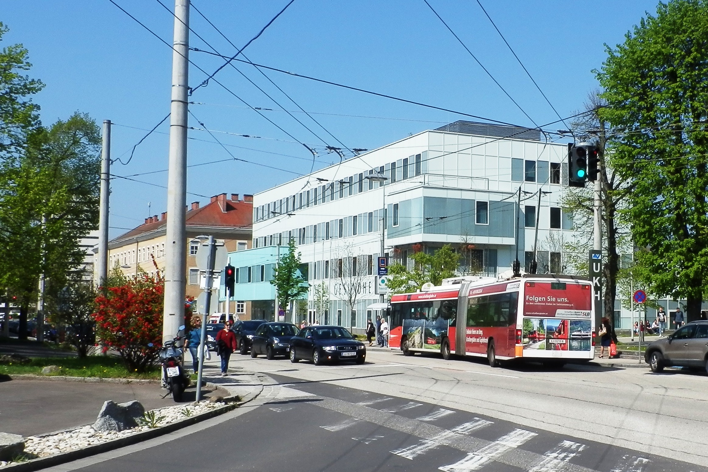 Linz AG Obus - Linie 45 in der Garnisonstraße, Haltestelle Paula-Scherleitner-Weg